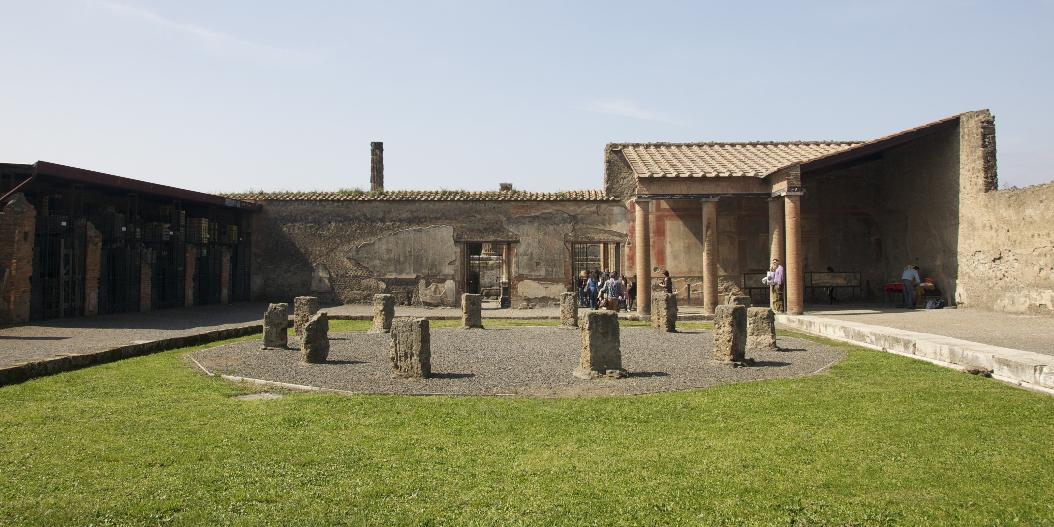 Pompei